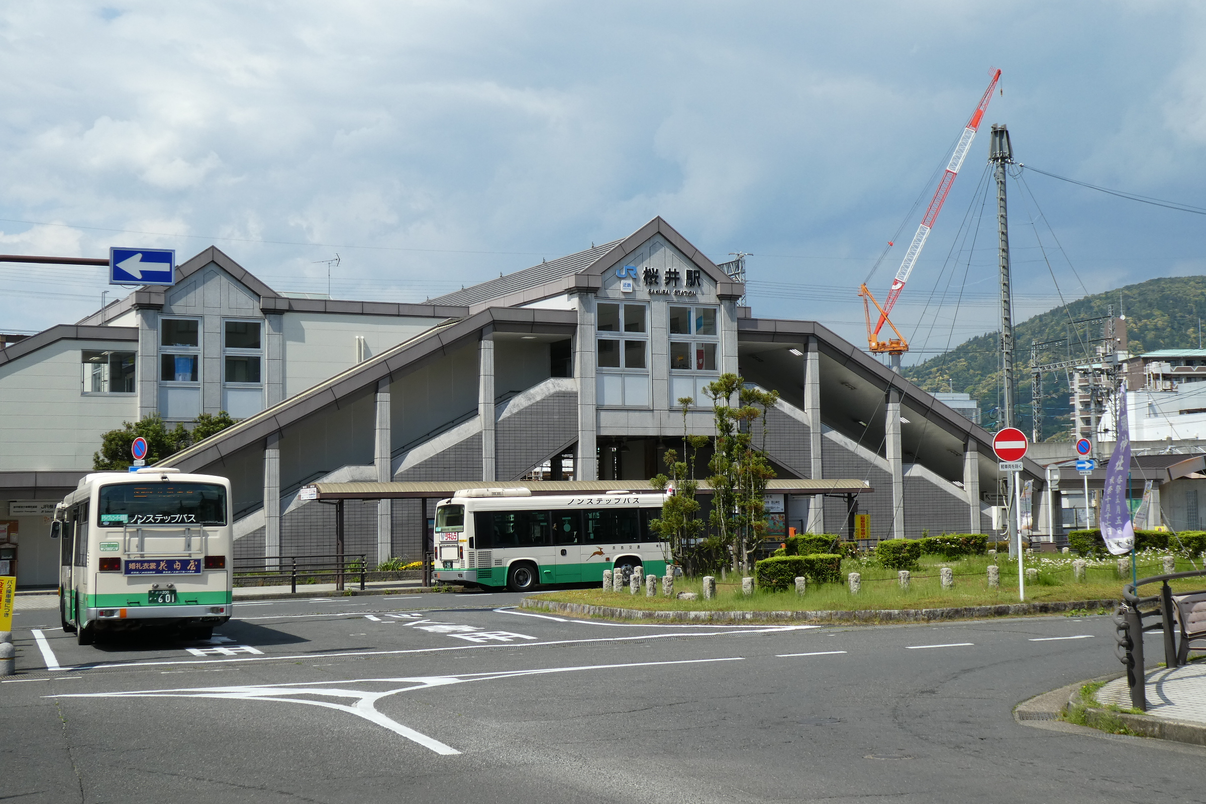 桜井線、近鉄大阪線桜井駅。南口。